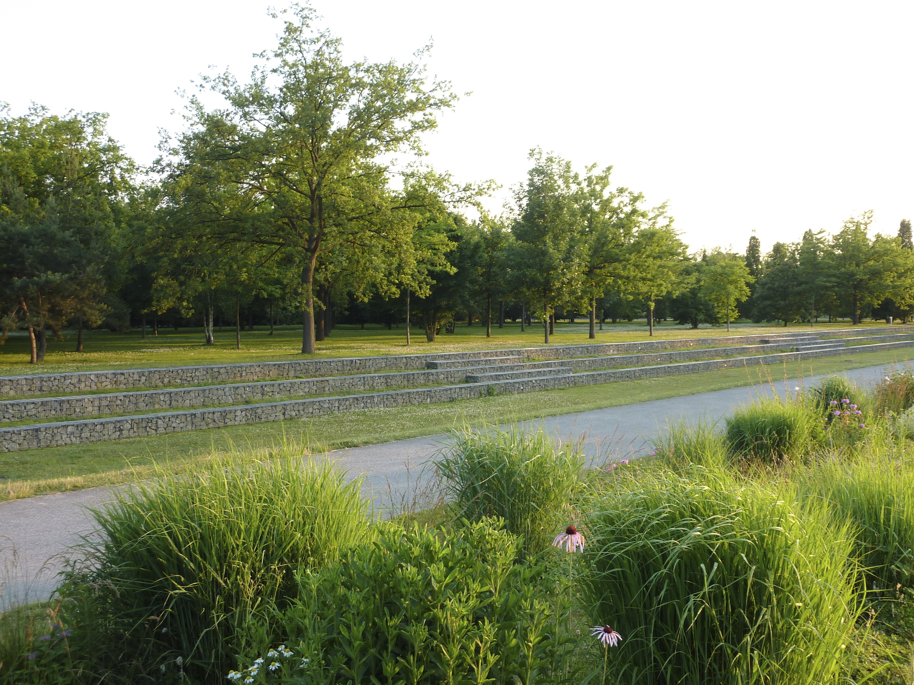 Frankfurt am Main, Stadtteil Bockenheim, Rebstockviertel: Der Neue Rebstockpark ist eine im Jahr 2005 eröffnete öffentliche Grünanlage, gestaltet im Stil moderner Landschaftsarchitektur. Das Foto zeigt „Präriestauden“ und den Fußweg am nördlichen Rand eines 400 Meter langen, „Rasengracht“ genannten Grabens im Park. Blick nach Südwesten